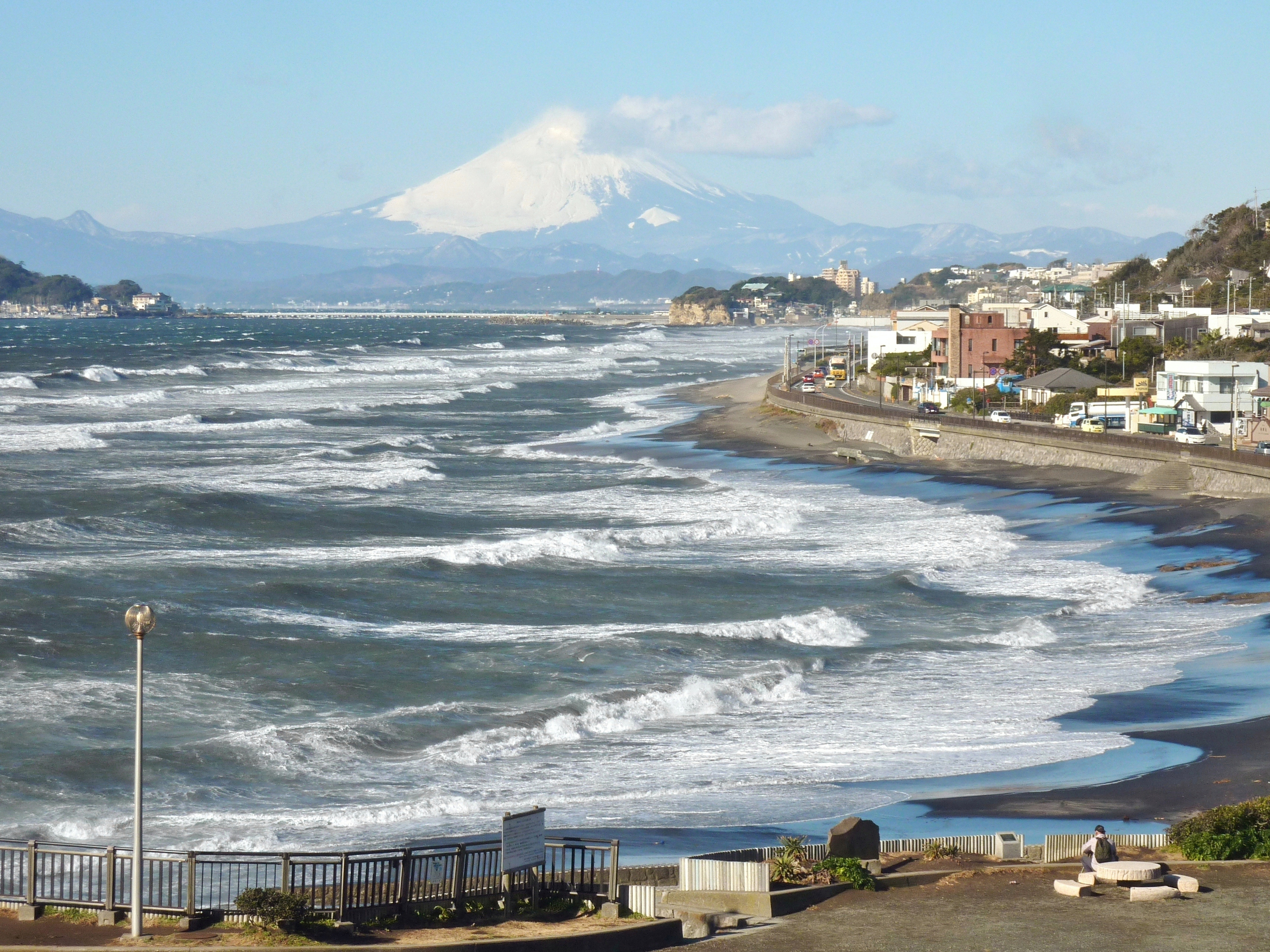 神奈川県鎌倉市・稲村ヶ崎から富士山を望む。冬にしては珍しく強い海風（南風）が吹いた影響で海の岸近くが濁っています。